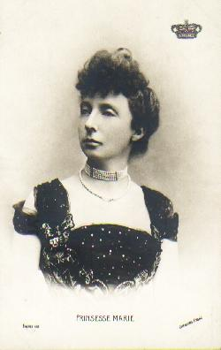 La princesa Maria d'Orleans, princesa de Dinamarca (married to Prince Valdemar of Denmark) Maria d'Orleans Prinsesse Marie af Orléans Princess Marie of Orléans (1865–1909) Marie d'Orléans (1865-1909) Marie van Bourbon-Orléans Marie av Orleans